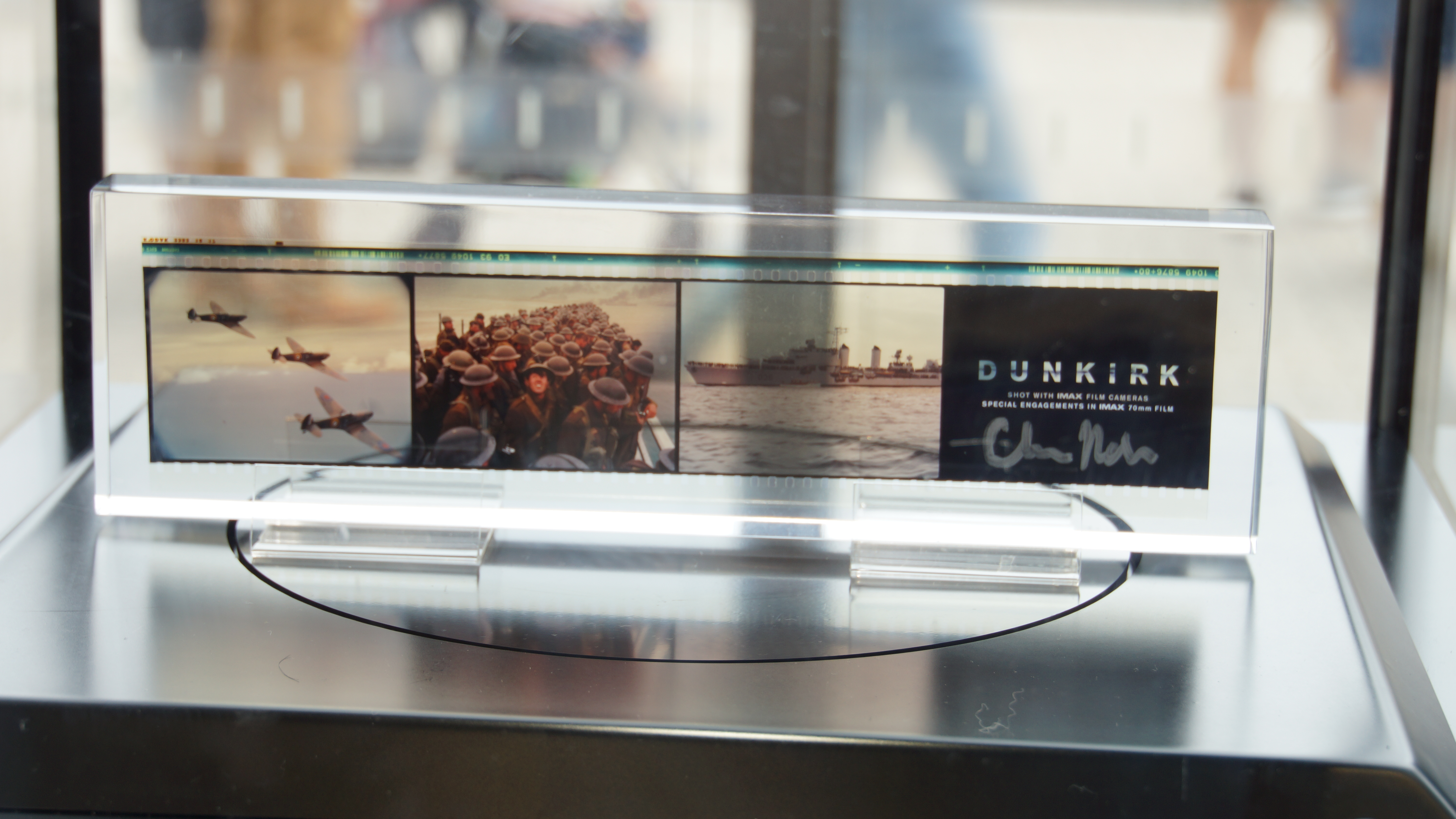 映画「ダンケルク」 クリストファー・ノーラン監督直筆サイン入り70mmフィルムプレート。2017年9月23日 109シネマズ大阪エキスポシティ館内にて。